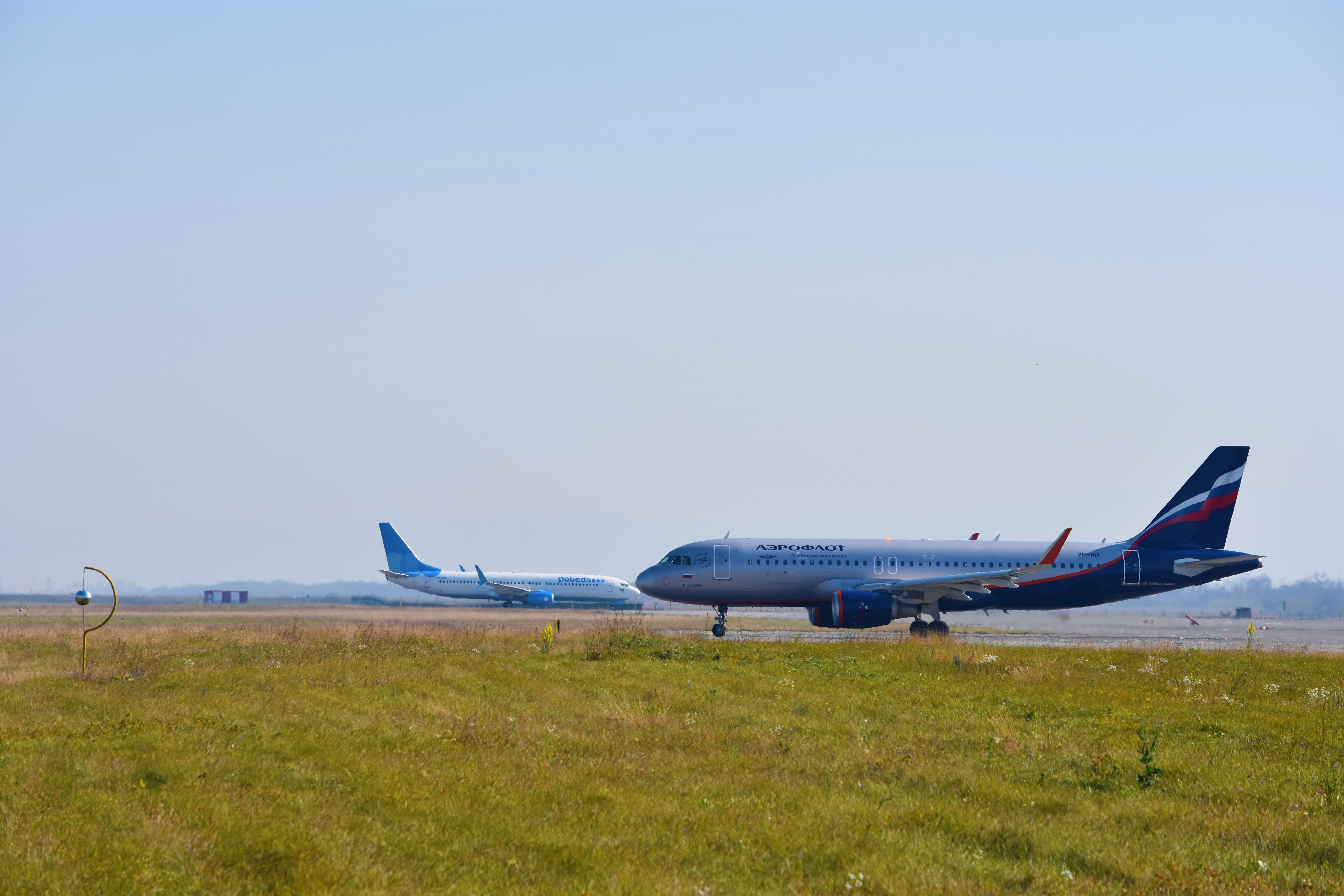 Перрон Международного аэропорта "Владикавказ"